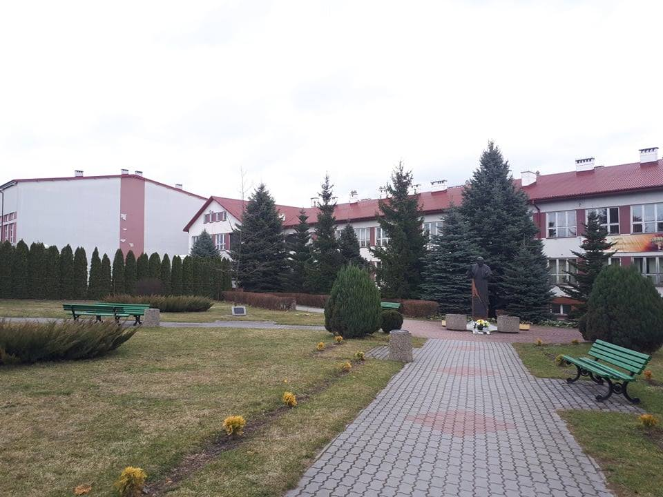 Budynek szkoły oraz hala sportowa